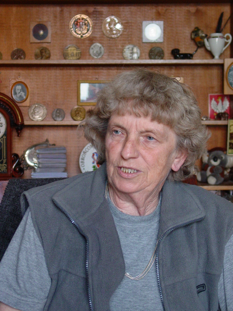 Danuta Barbara Łomaczewska